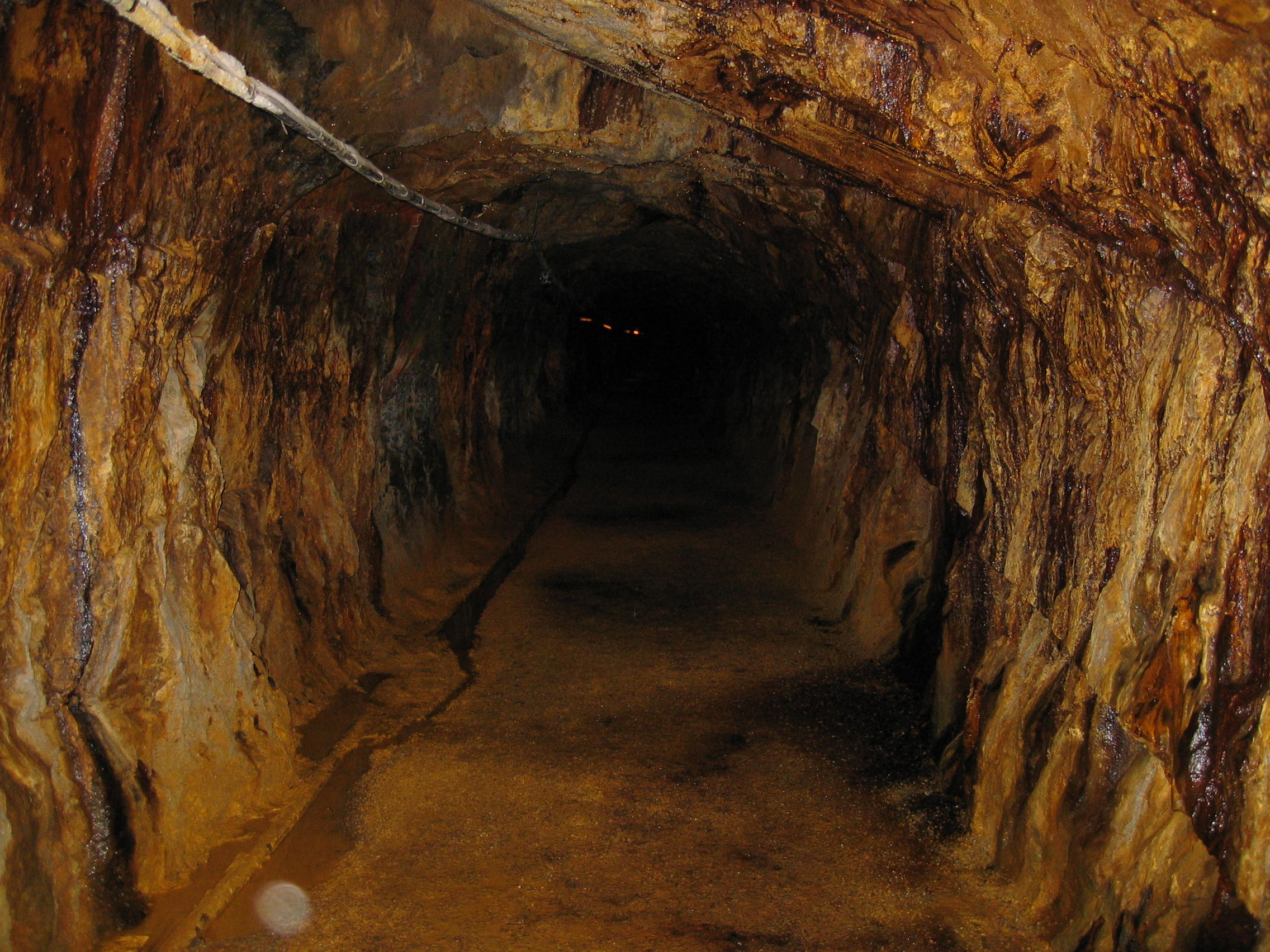 Falu Koppargruva. Fotografi taget av mig själv, 2006 Falu Koppargruva. Photograph taken by me, 2006